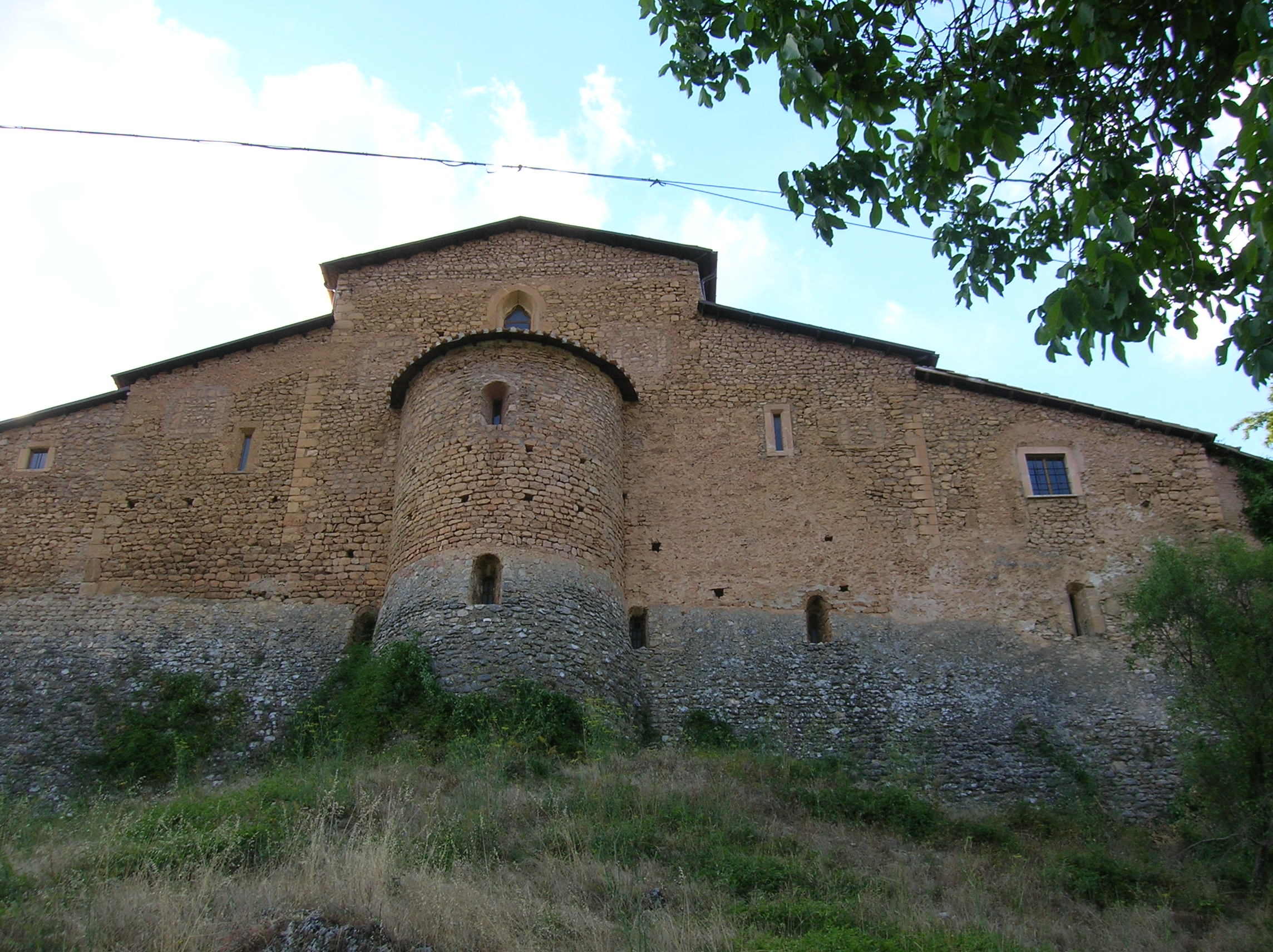 chiesa di S. Maria Assunta e di San Franco, del 1150 (Assergi) (Italia)